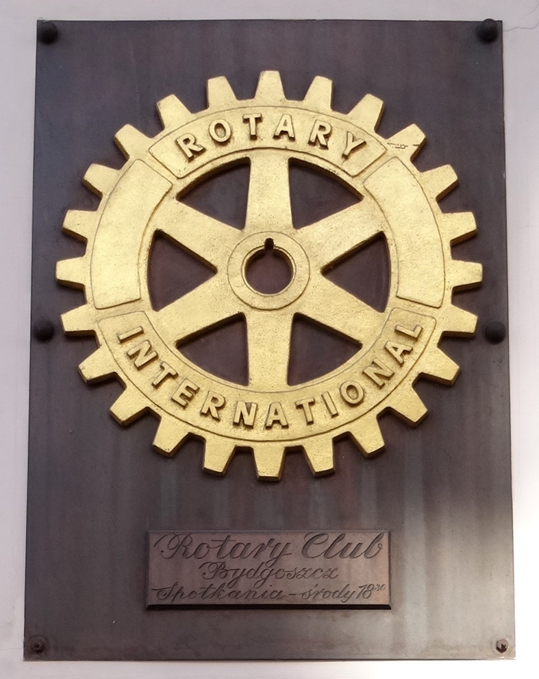 Fasada hotelu Pod Orłem w Bydgoszczy (1896, Józef Święcicki), ul. Gdańska 14